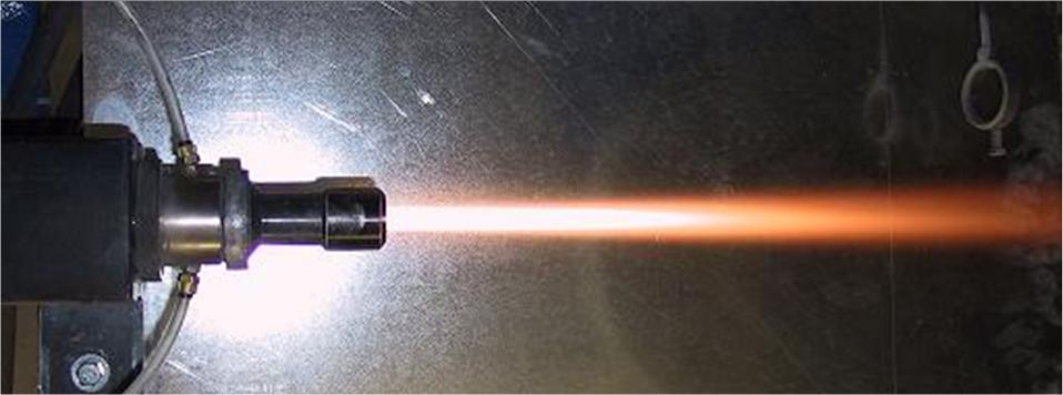 HVOF-Freistrahl eines Kerosinbrenners mit Pulver (WC/Co 88/12)